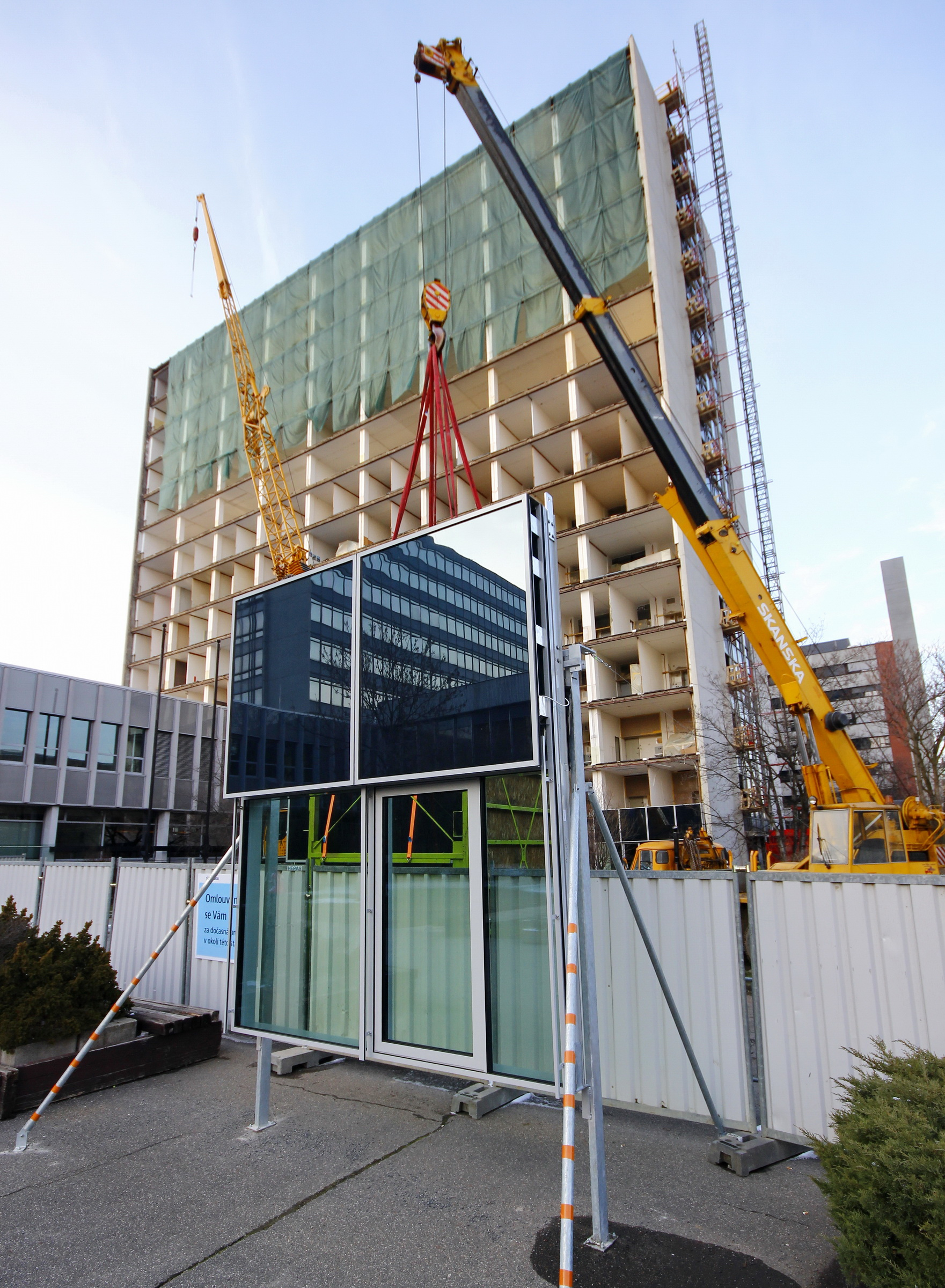 ČVUT Praha, budovy FSv, budova A, demontáž obvodového pláště. Vzorek budoucího pláště.